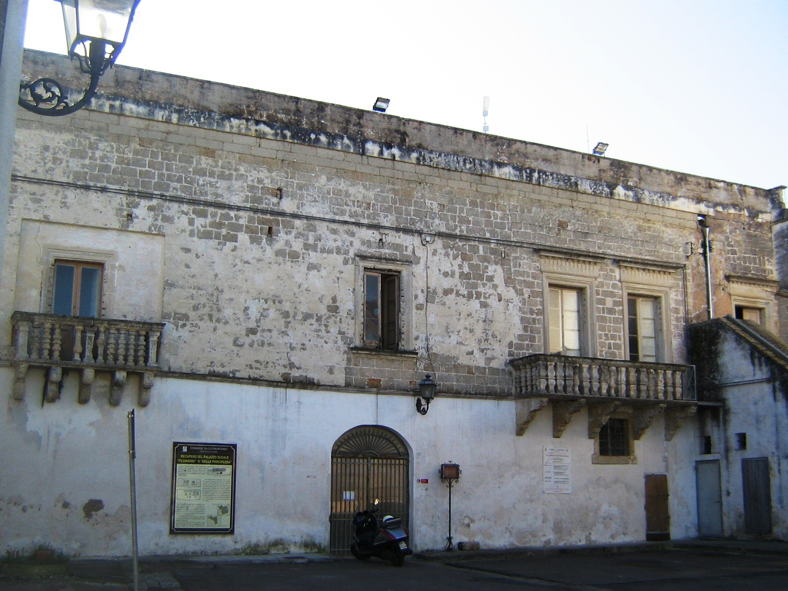 Palazzo Filomarini Cutrofiano